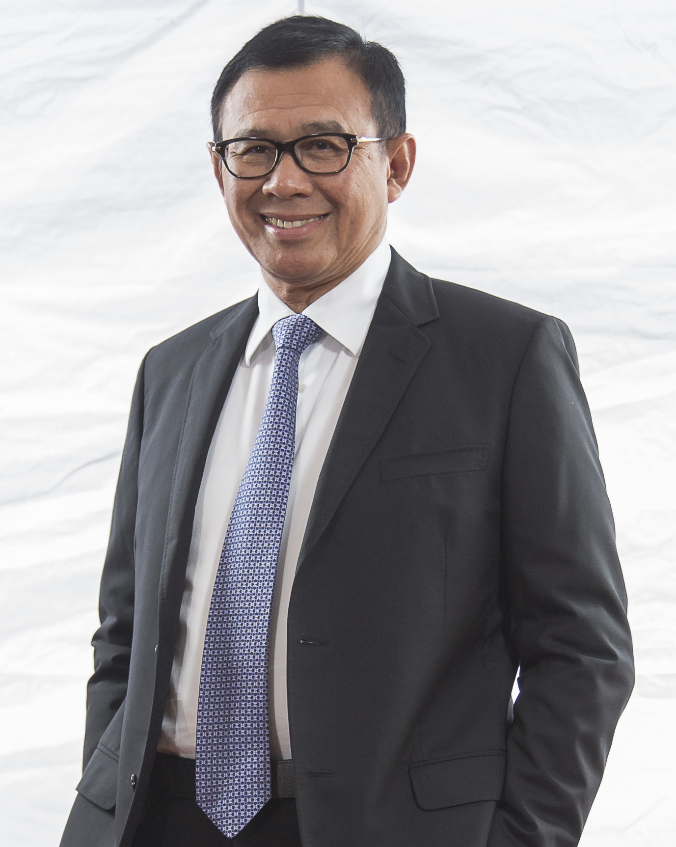 Achmad Baiquni adalah seorang Bankir yang lahir di Surabaya, Jawa Timur, Indonesia pada tanggal 1 Januari 1957